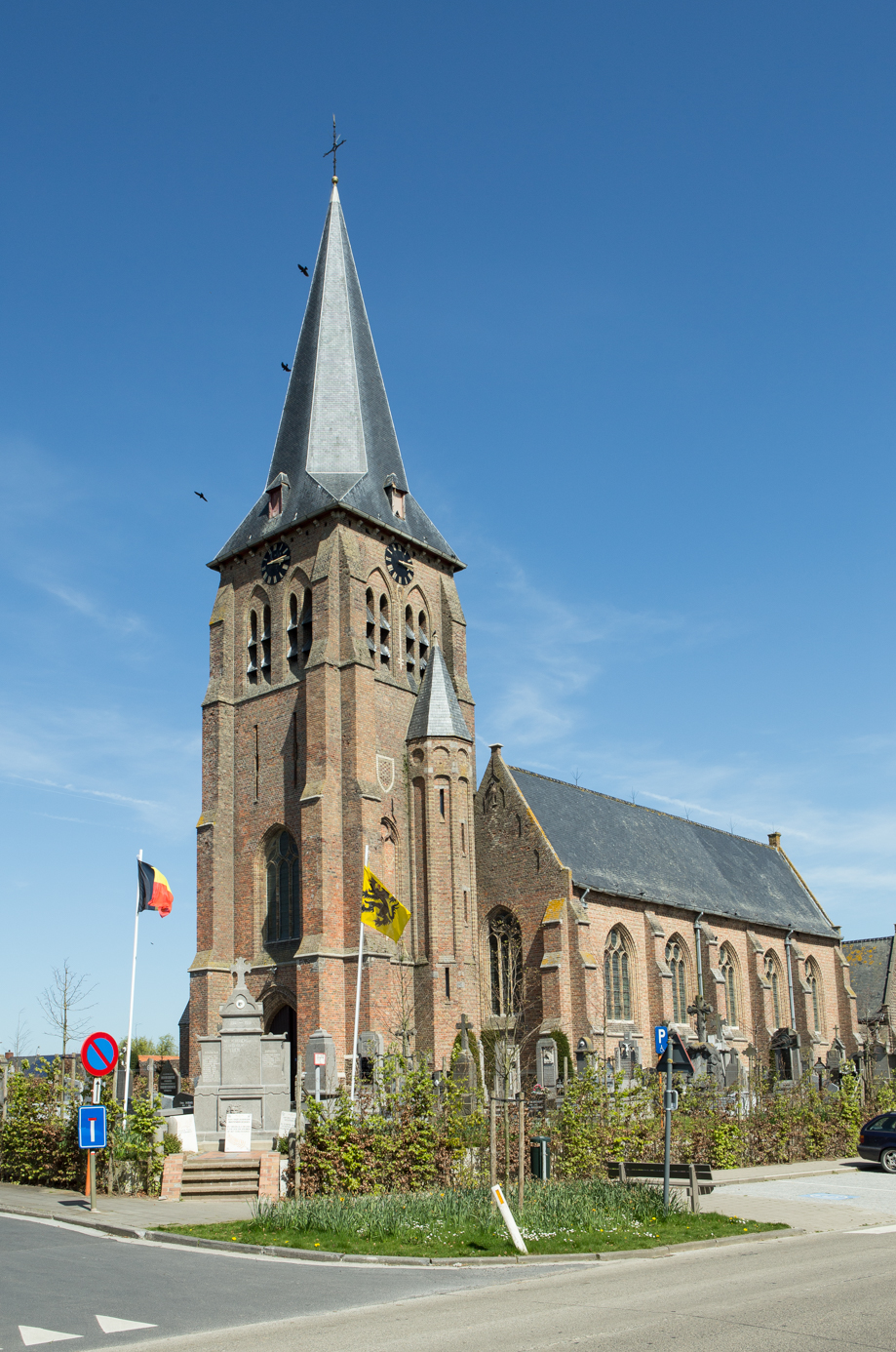 Wulvergem Churchyard